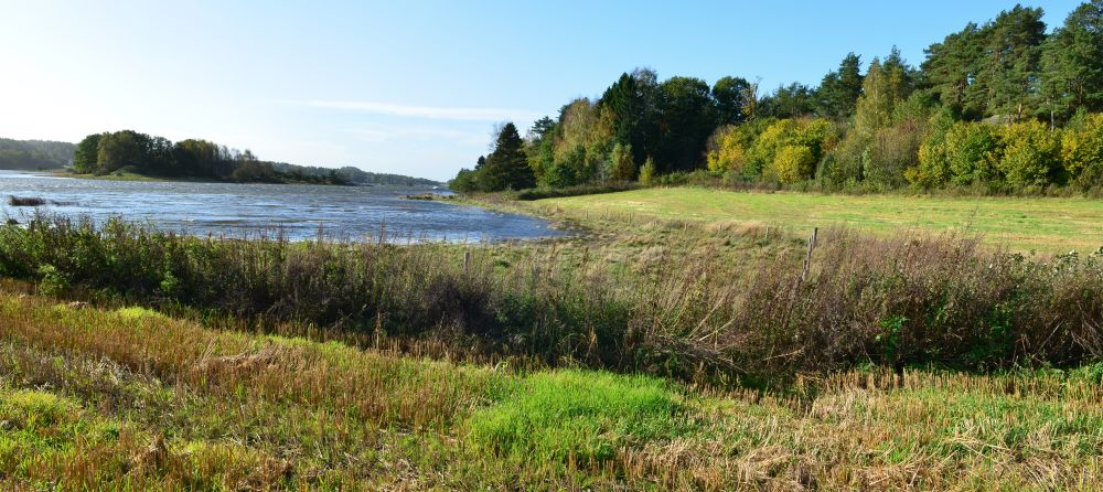 Vikerøya landskapsvernområde.